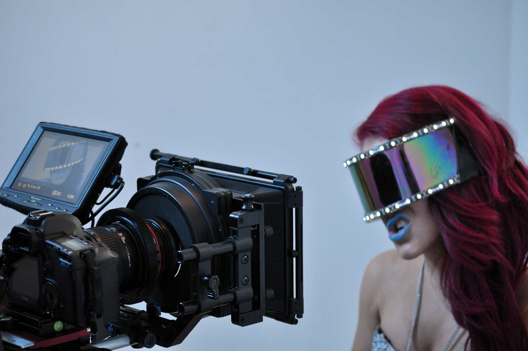 Singer Giulietta